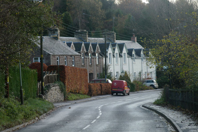 Dunkeld Road Bankfoot